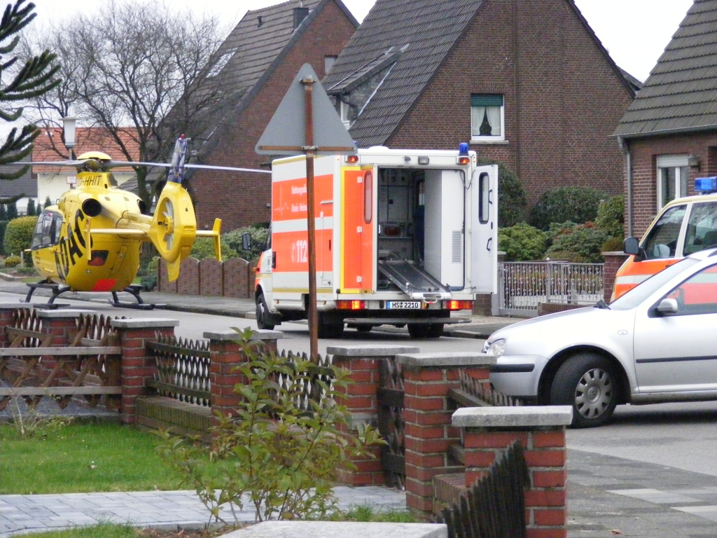 Verschiedene Rettungsmittel im Einsatz: Rettungshubschrauber Christoph Europa 1, Rettungswagen Florian Heinsberg 6-83-1 und Notarzteinsatzfahrzeug Florian Heinsberg 5-82-1